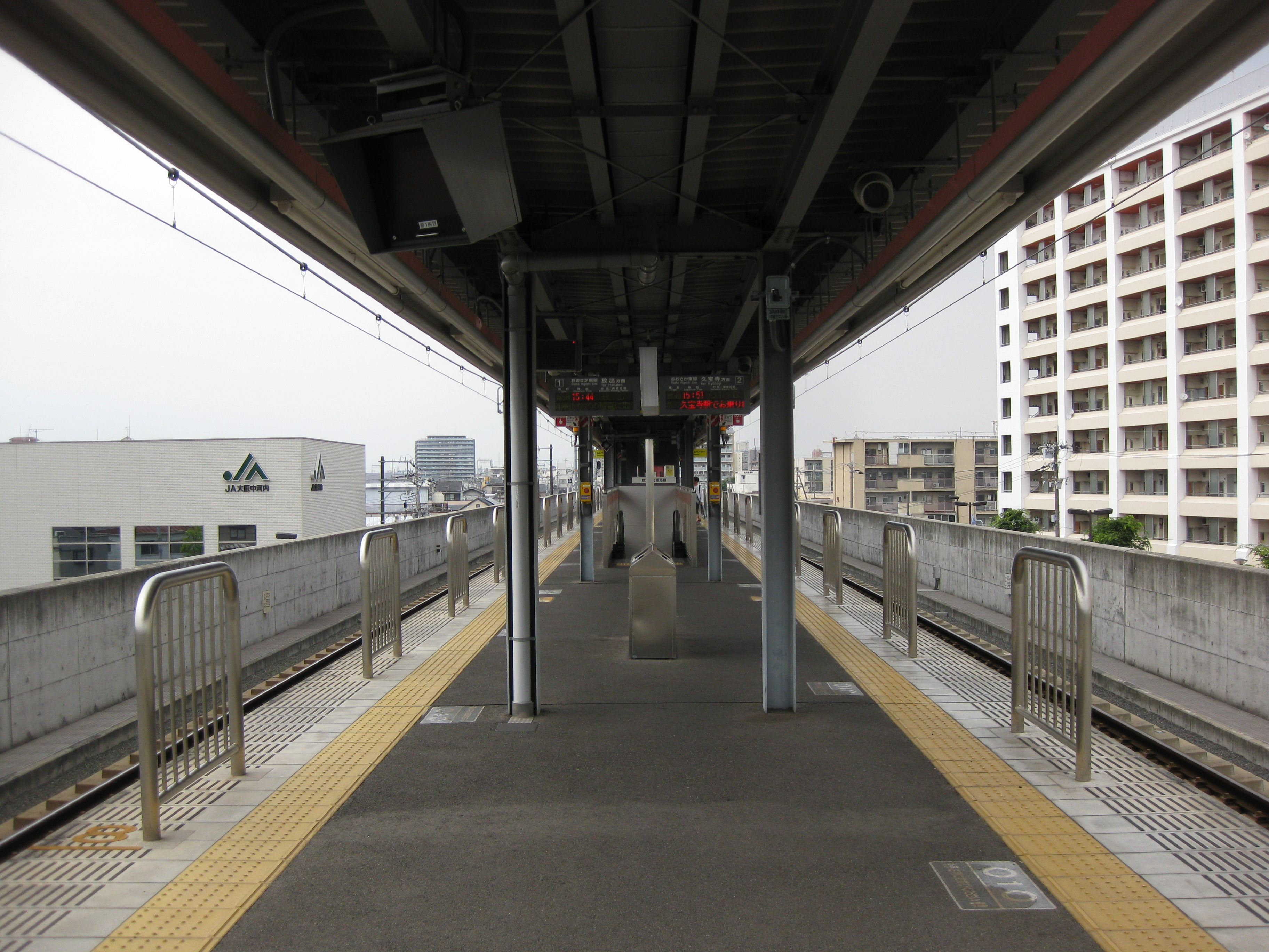 JR長瀬駅プラットフォーム